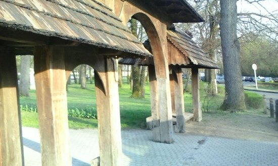 nyíregyháza -sóstó -székelykapu